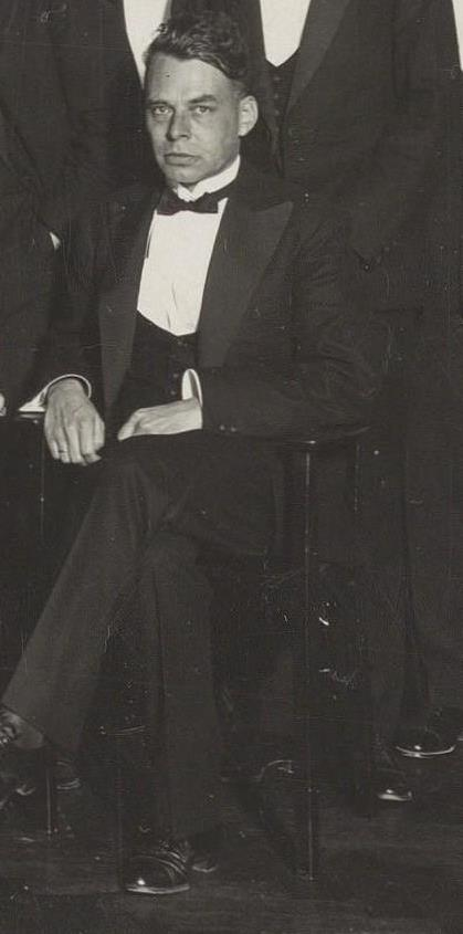 Dr. J.M. Bijvoet. Viering van het 25-jarig hoogleraarsjubileum van prof. dr. Andreas Smits (1870-1943), hoogleraar in de chemie aan de Gemeente Universiteit, in het Vondelparkpaviljoen, Vondelpark 3